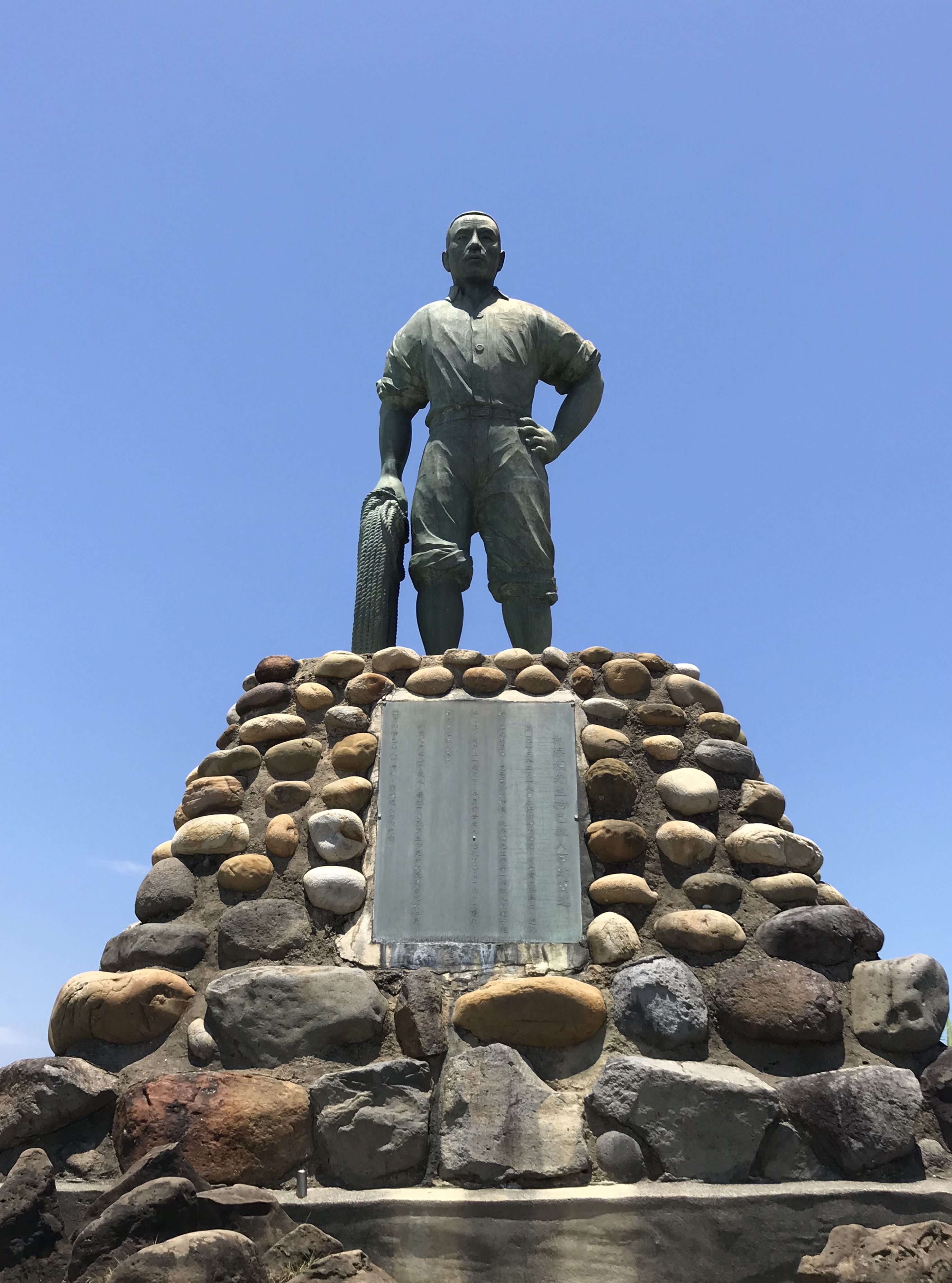 中文（台灣）: 林添禎銅像正面照